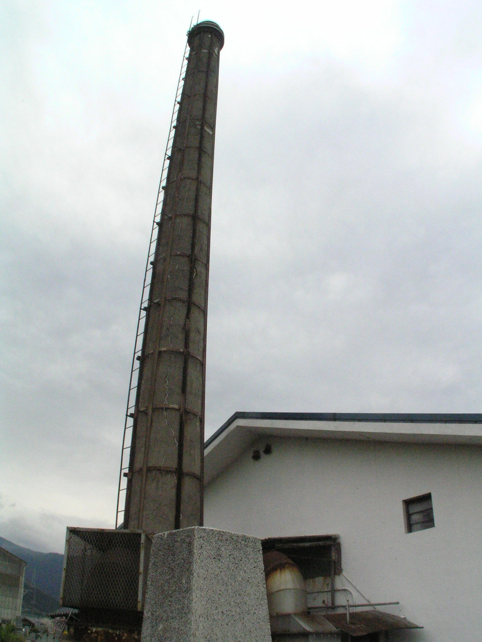 廃墟となった火葬場の煙突。 四国中央市土居町火葬場。 ～photo by Autumn Snake 【おぉたむ すねィく 探検隊】廃墟･建築探検斑 勅使河原賢明